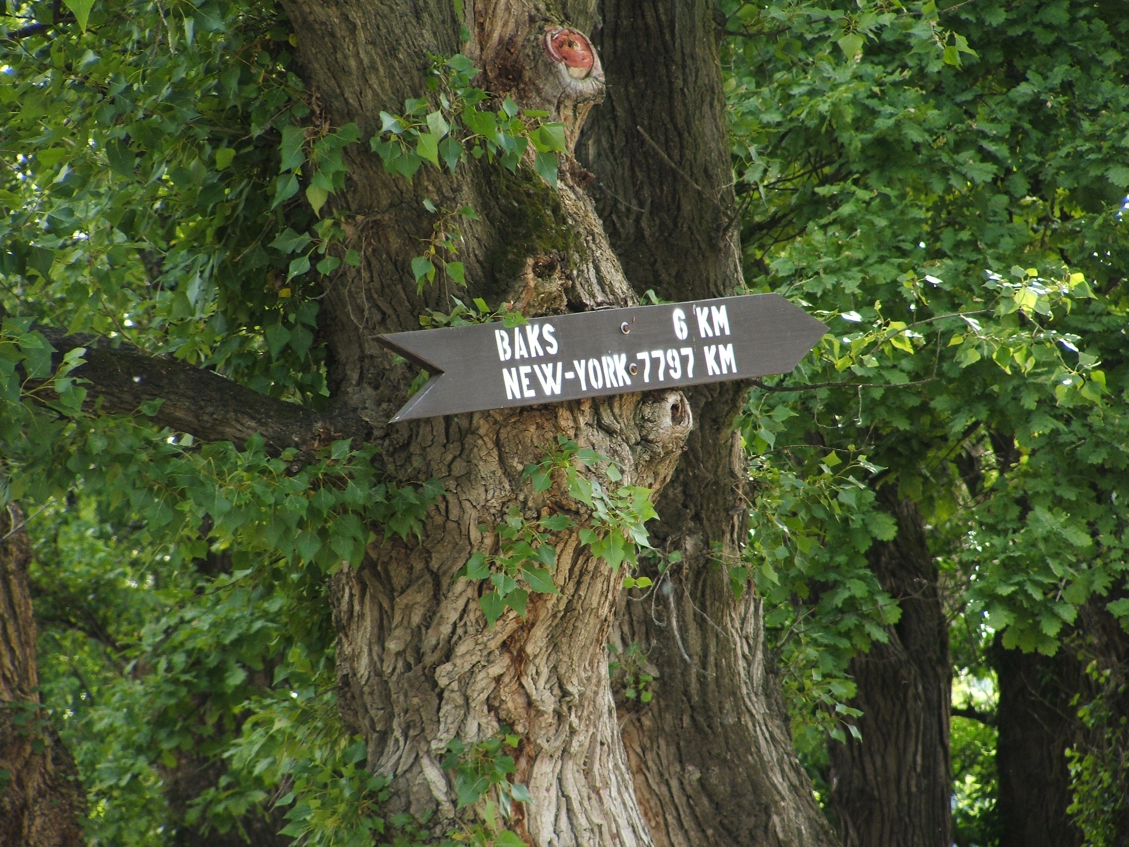 Különleges útjelző támla a mindszenti tiszai kompnál.